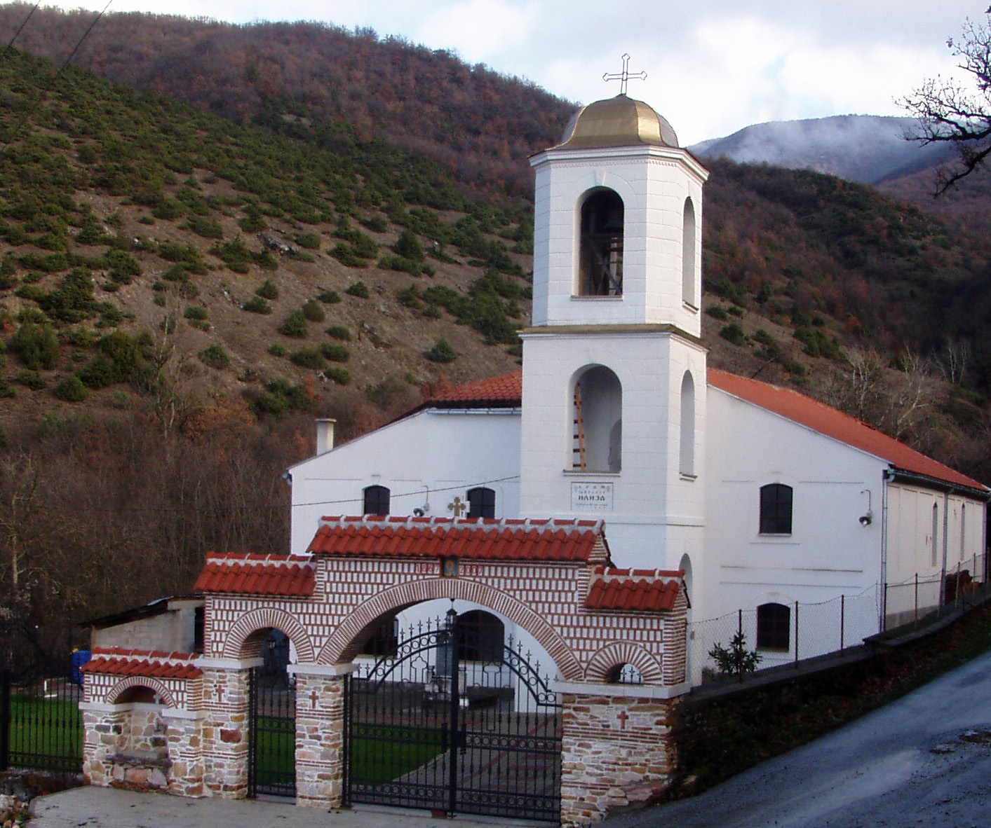 Црква Св.Пророк Илија с.Стенче горни Полог